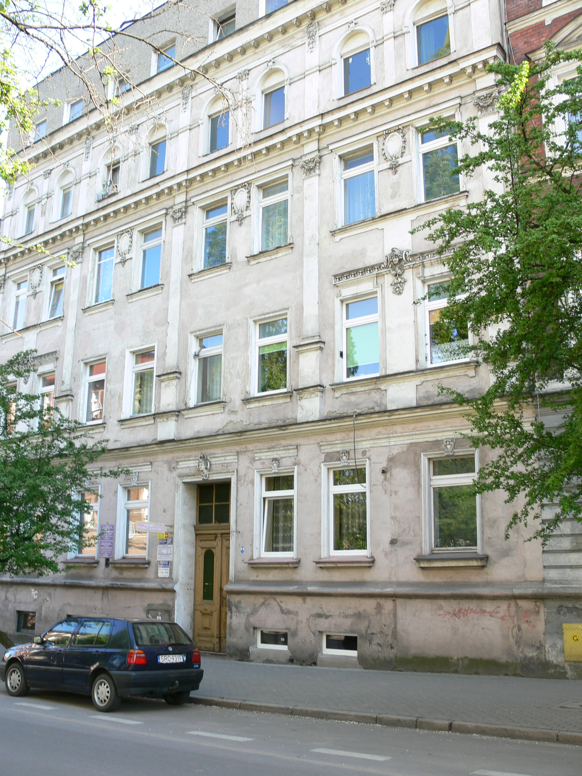 Racibórz - kamienica przy ul. Staszica 27